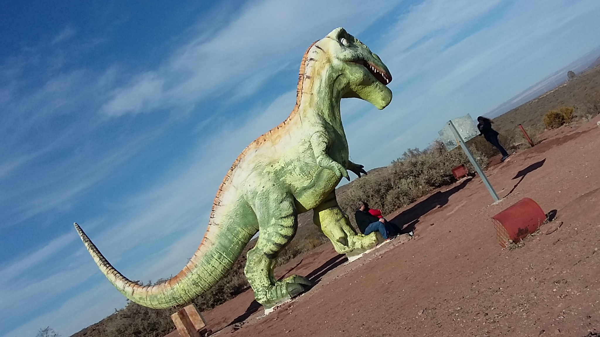 Camino de dinosaurios en el acceso a Villa El Chocón, Neuquén. Es una atracción turística en donde quienes la visiten pueden sacarse fotos y experimentar cómo se verían los dinosaurios en la zona.